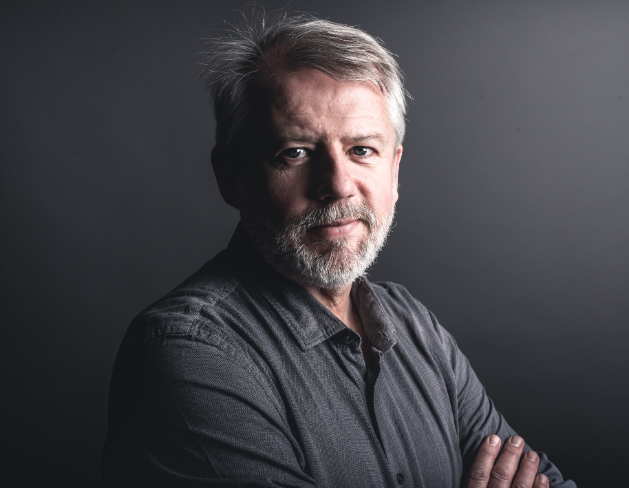 L'acteur et auteur Jacques Chambon par le photographe Jean Combier. Shooting photo pour la web-série Les nouvelles Métamorphoses, produite par l'ensemble de musique baroque Le Concert de l'Hostel Dieu.